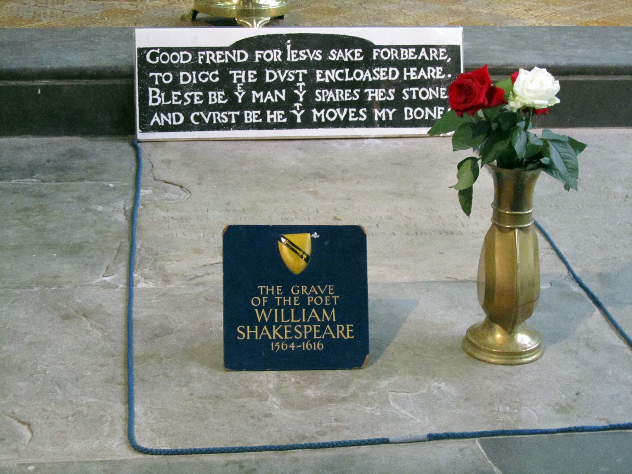 Church of the Holy Trinity, Stratford-upon-Avon ; das Grab von William Shakespeare